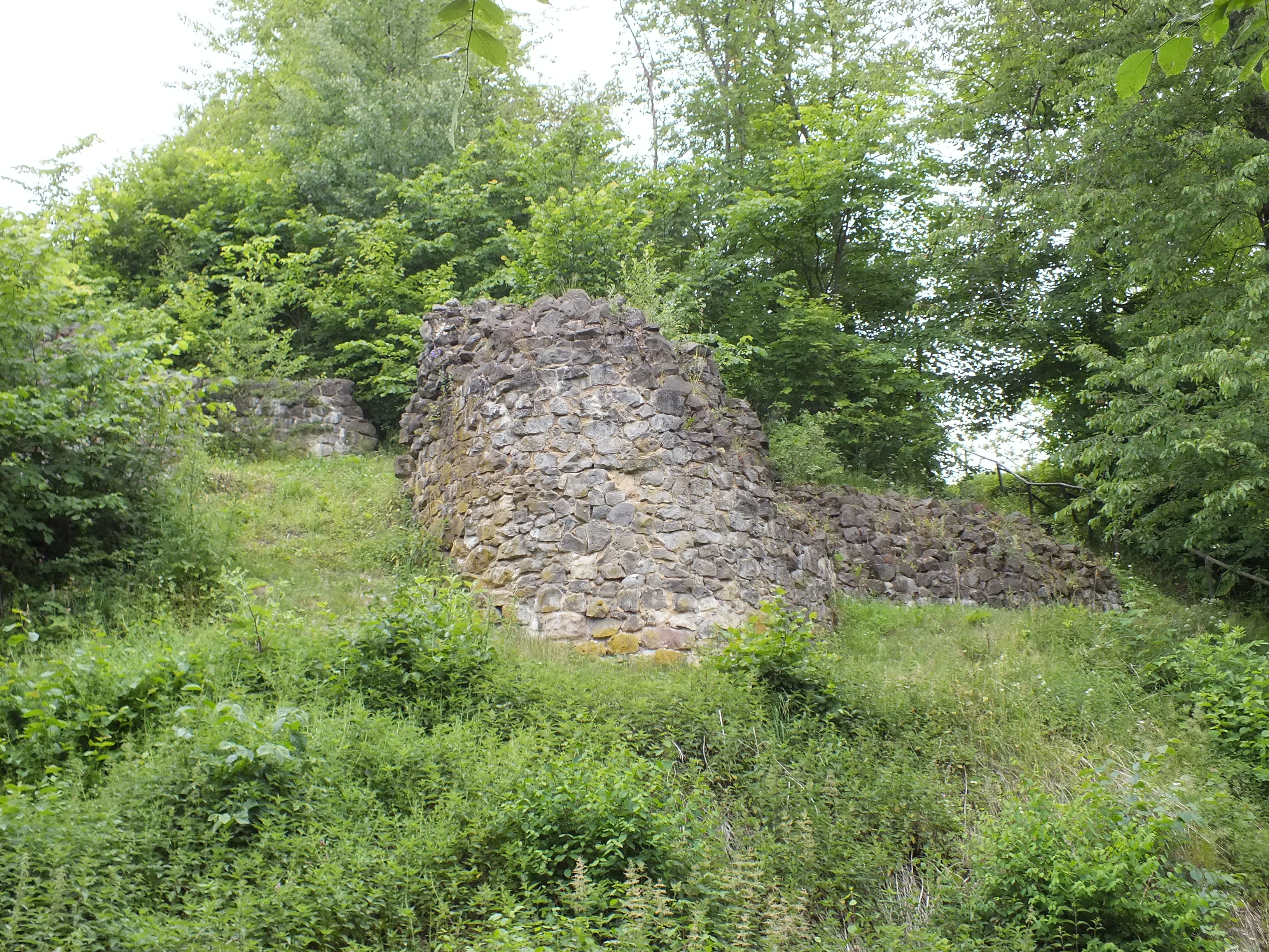 Bei Grabungen freigelegte Mauerreste der Burgruine Schauenburg